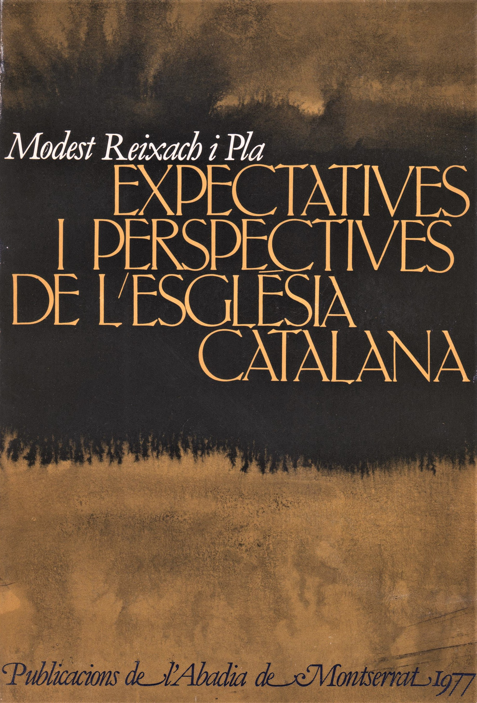 Portada de llibre